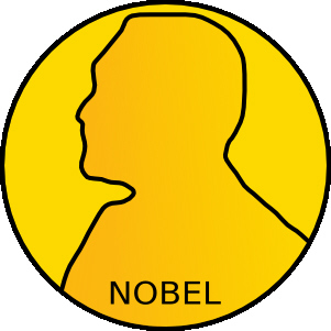 Immagine stilizzata della medaglia del premio Nobel